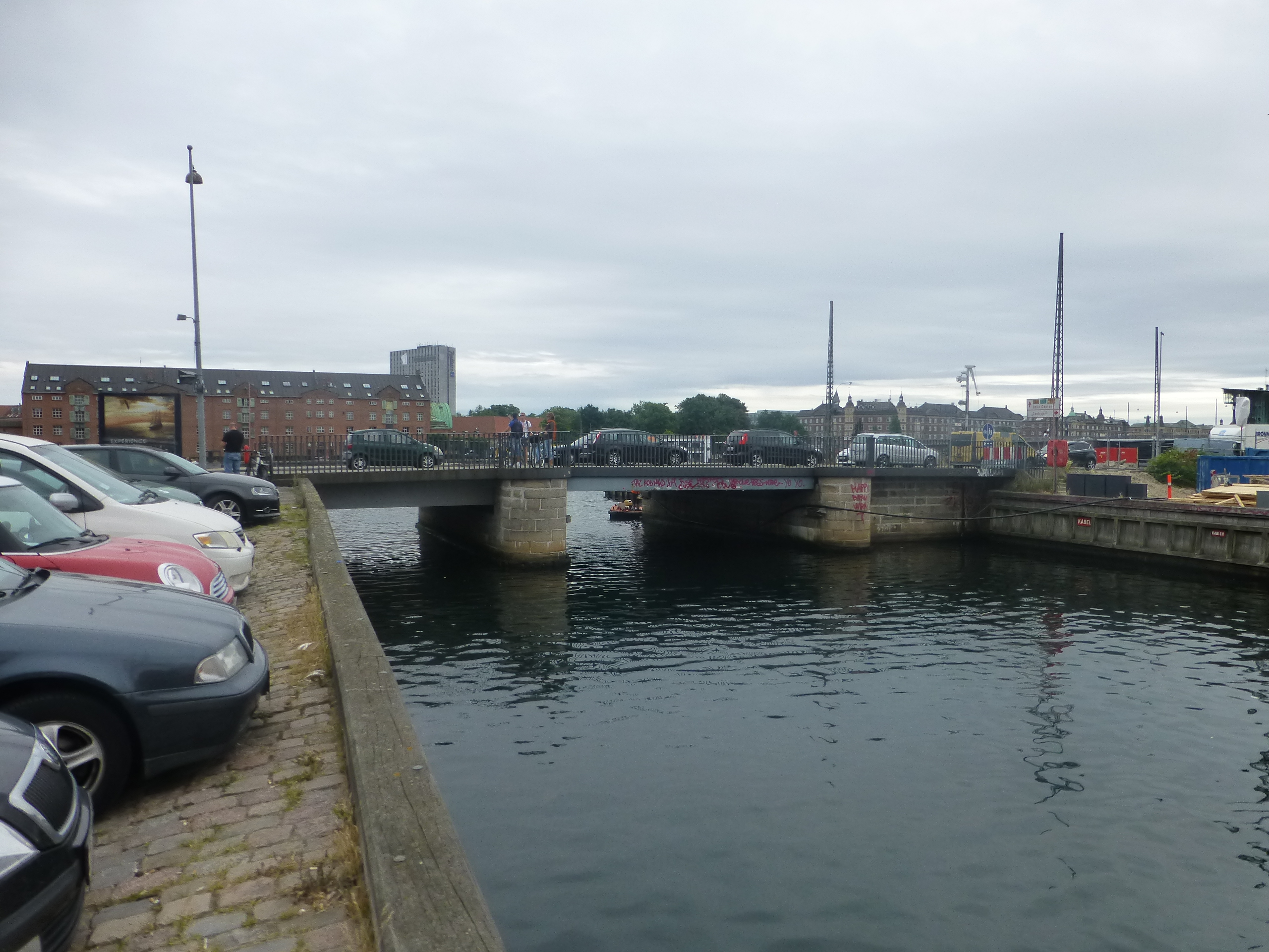 The bridge Bryghusbroen between Sjælland and Slotsholmen in Copenhagen.